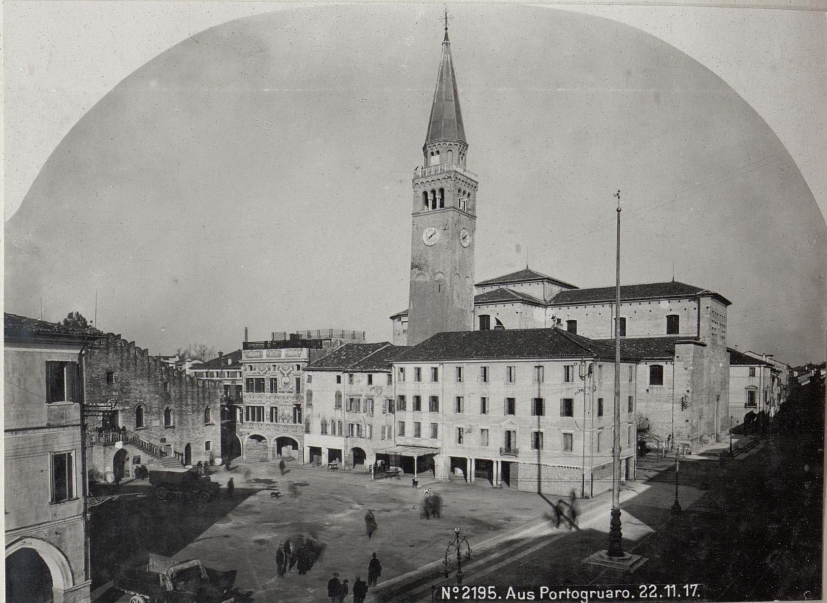 Aus Portogruaro. 22.11.17.